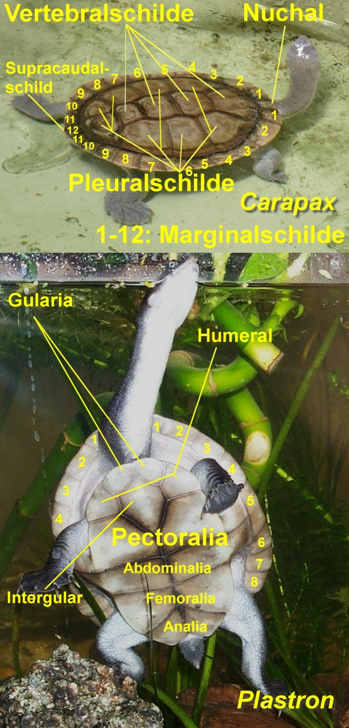 Aufbau des Panzers der McCordi Schlangenhalsschildkröte